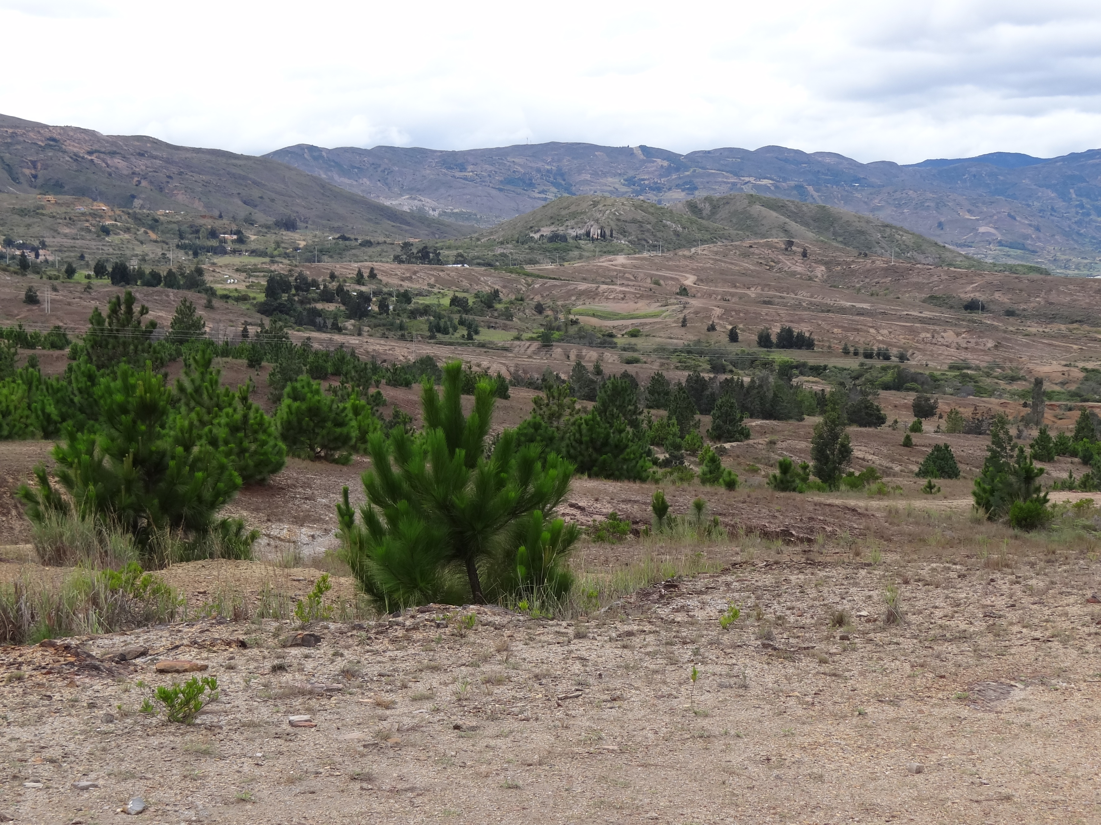 Paraje semidesértico en alrededores de Villa de Leyva, departamento de Boyacá, Colombia